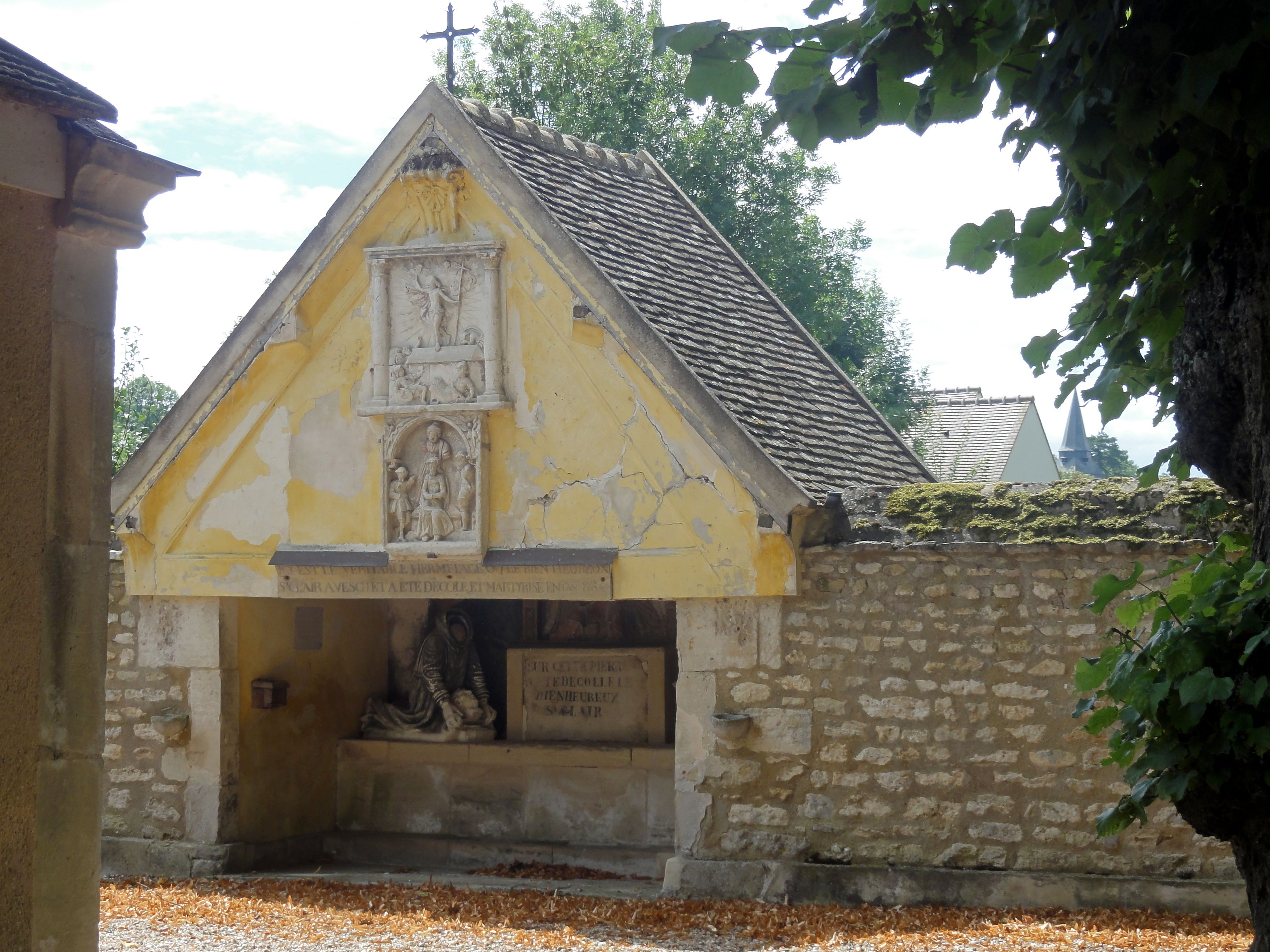 L'oratoire faisant face à la chapelle.